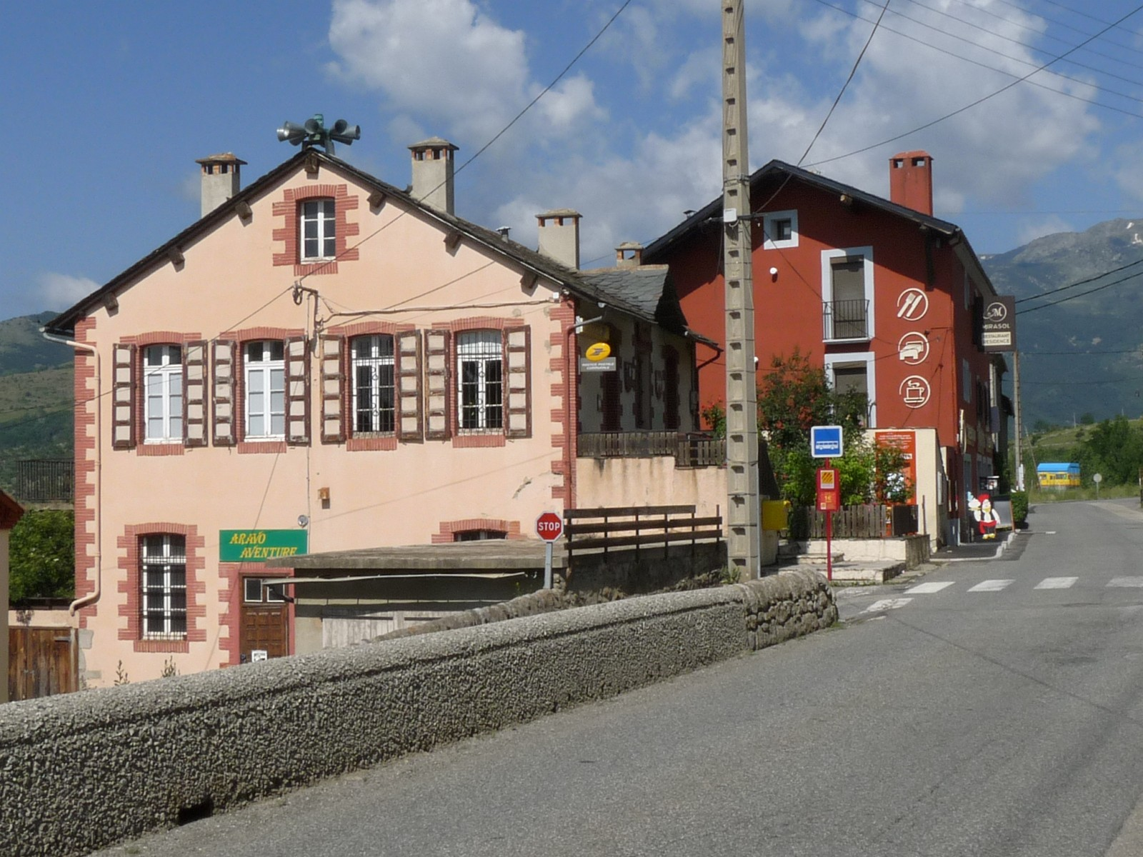 Poste, restaurant, route nationale 20, Enveitg, Pyrénées-Orientales, France